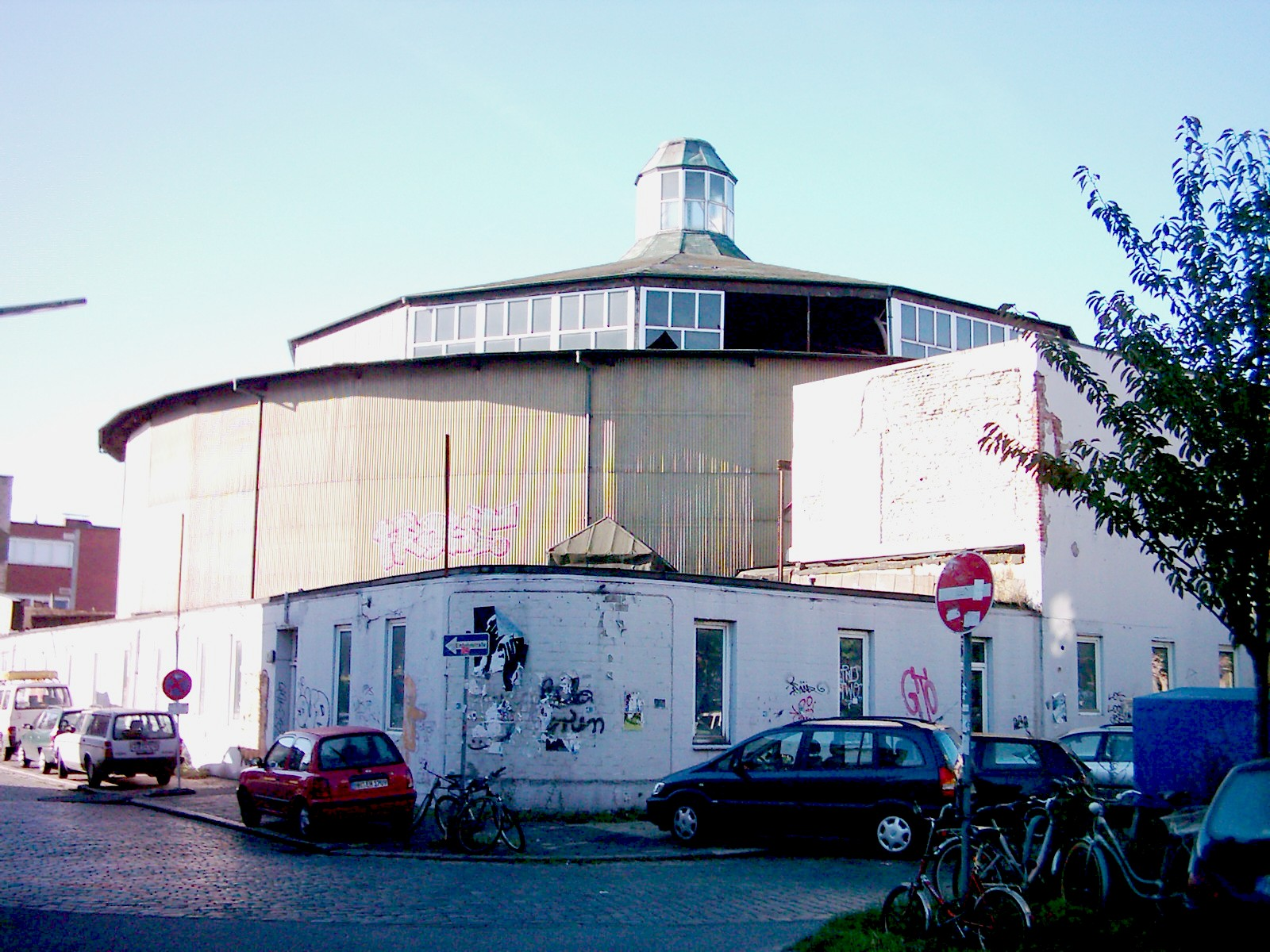 Schiller Oper, Hamburg-St. Pauli.